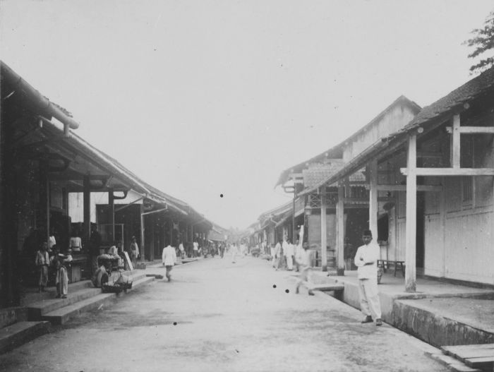 foto. Straat in de Chinese wijk van Belinjoe